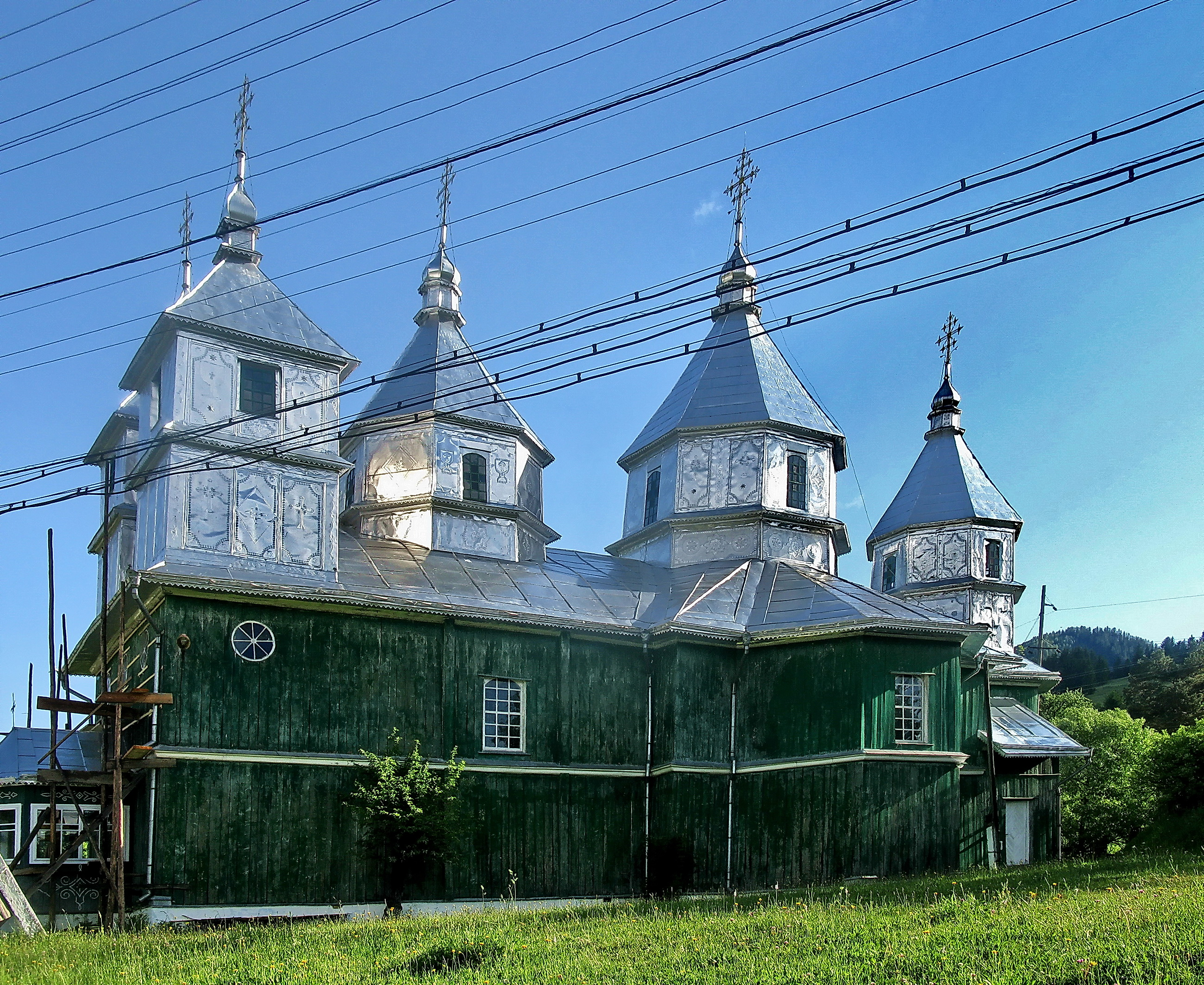 Дмитрiвська церква (дер.), Дихтинець